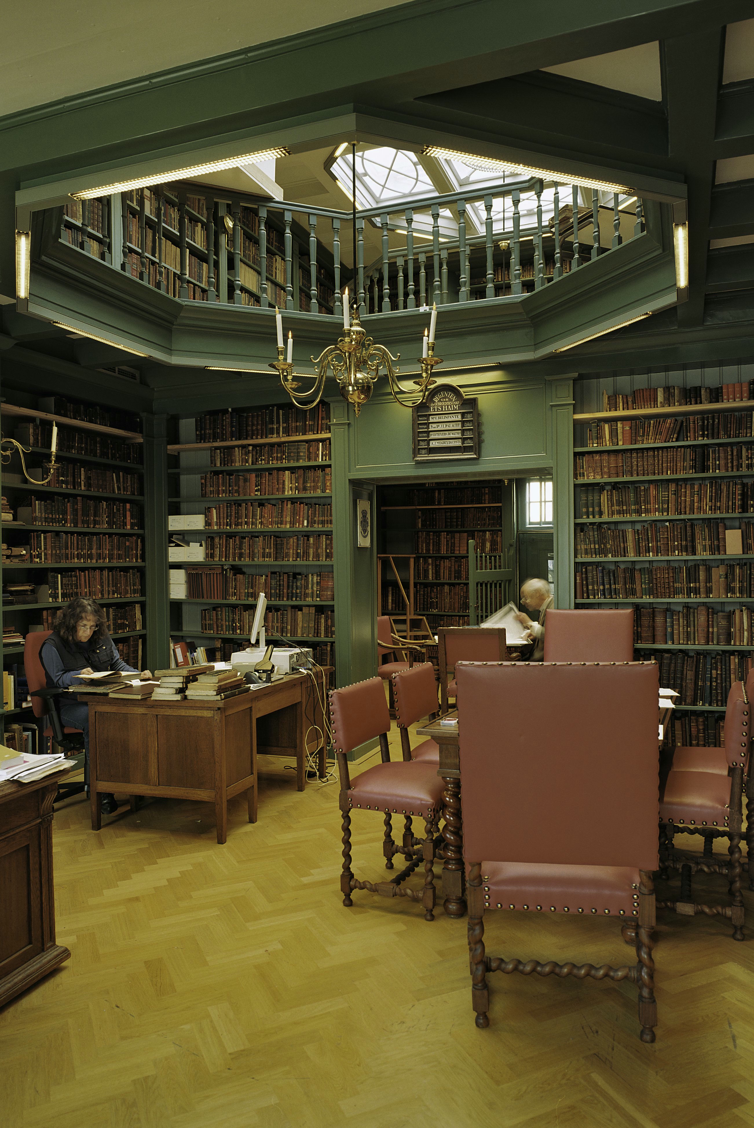 Portugese synagoge: Interieur van de bibliotheek Ets Haim van de Portugese Synagoge te Amsterdam (opmerking: Gefotografeerd voor Monumenten In Nederland Noord-Holland)